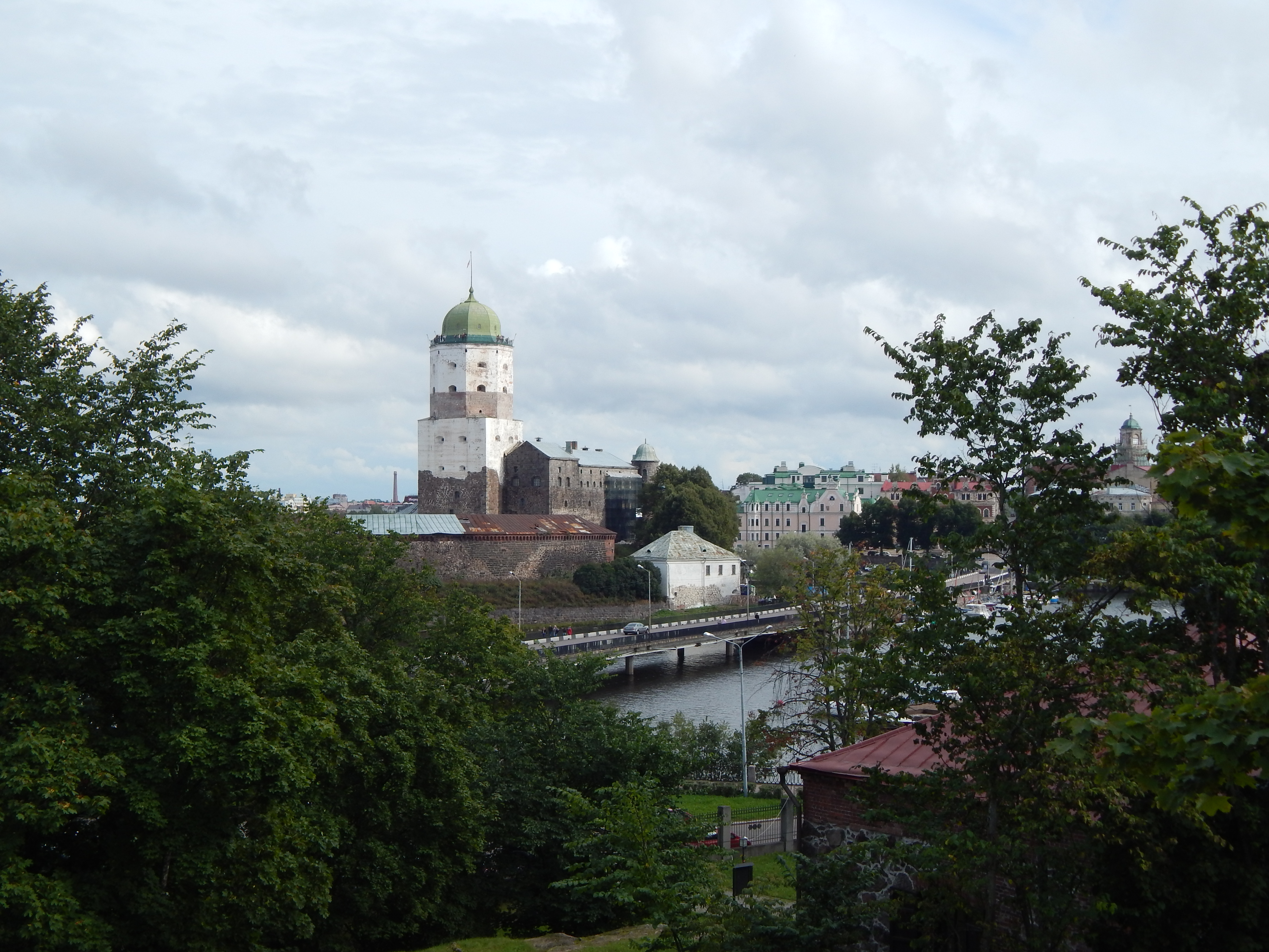 Замок-крепость (комплекс крепостных построек и сооружений на острове): Выборгская слобода, о. Замковый, Выборг, Выборгский район, Ленинградская область